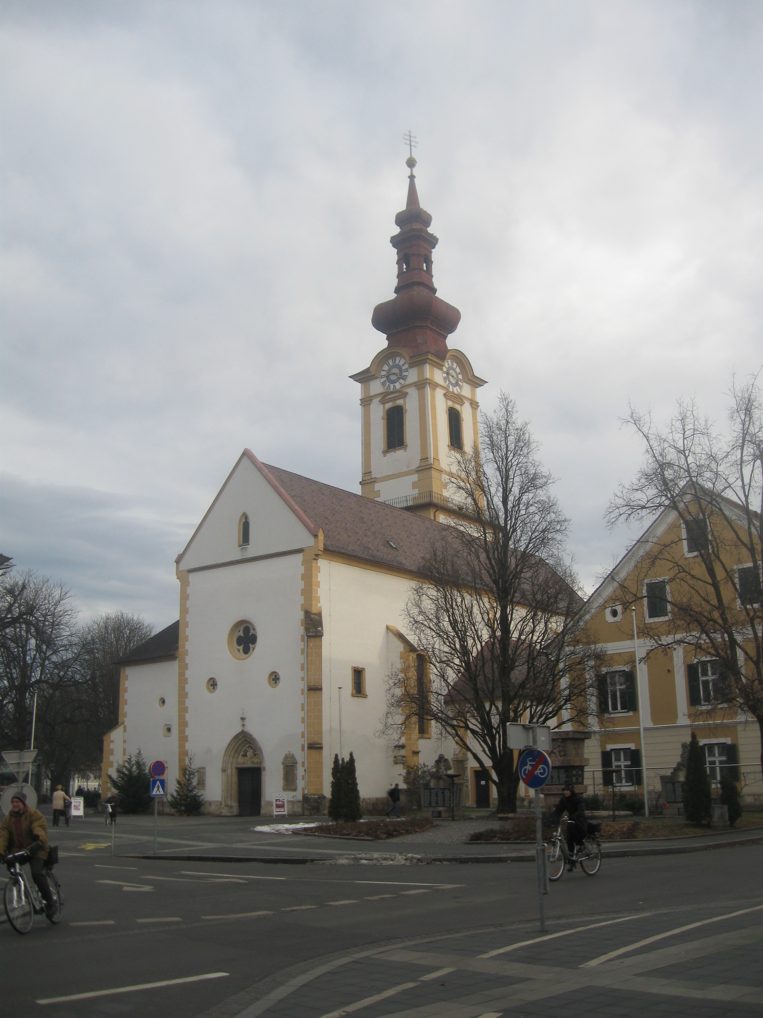 Stadtpfarrkirche in Leibnitz